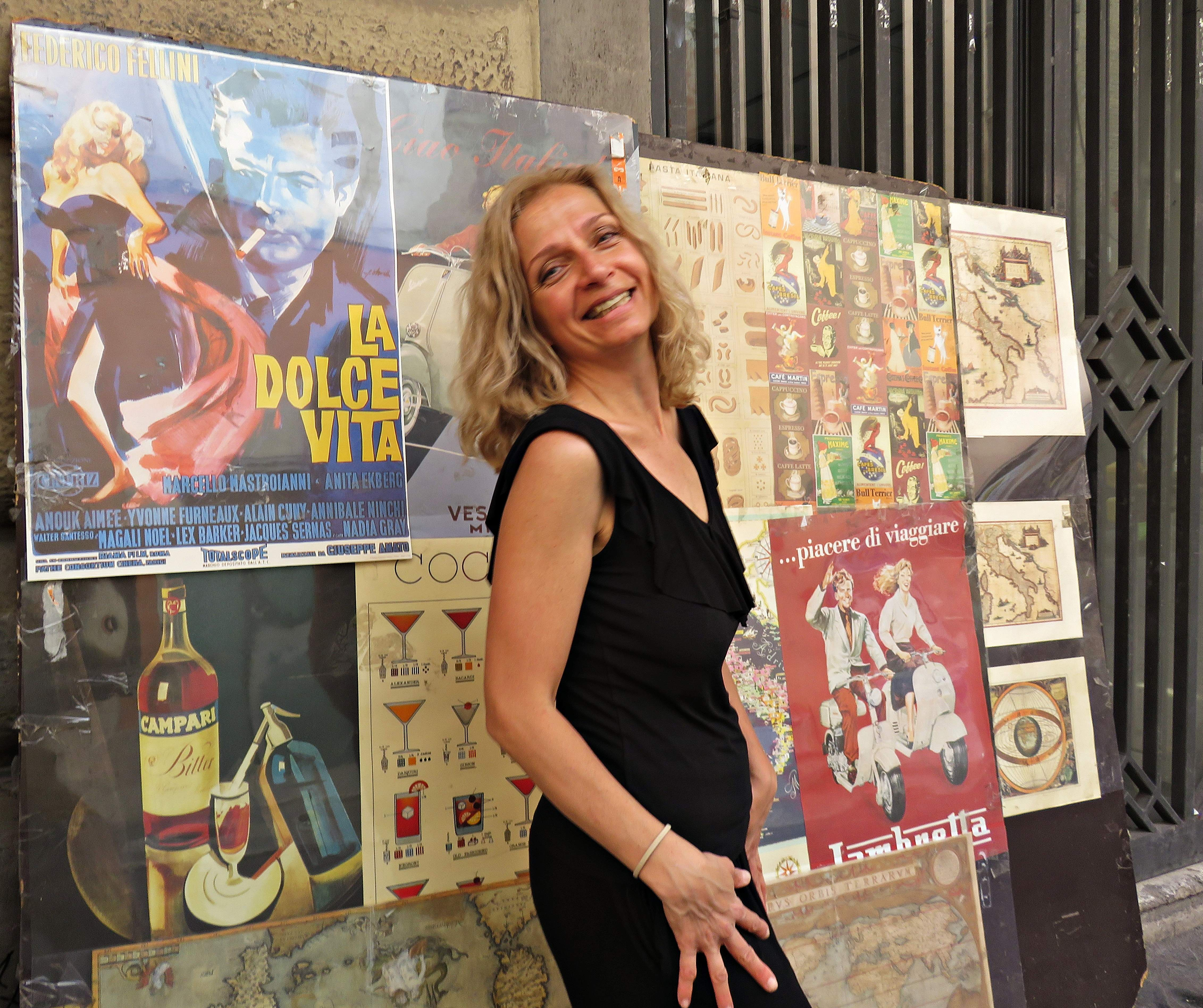 Nagy Natália Rómában, 2017